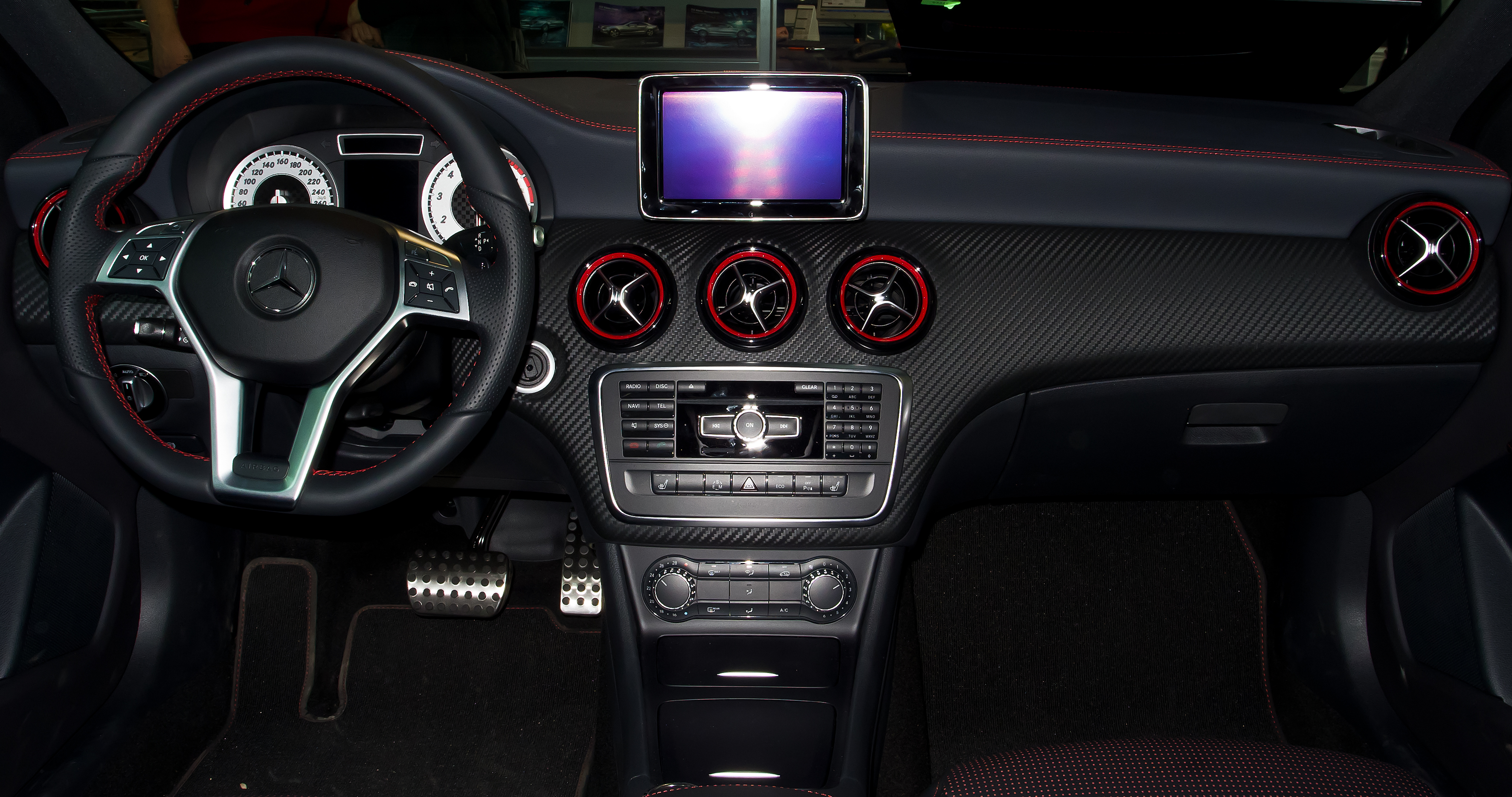 Mercedes-Benz A 250 Sport (W 176)